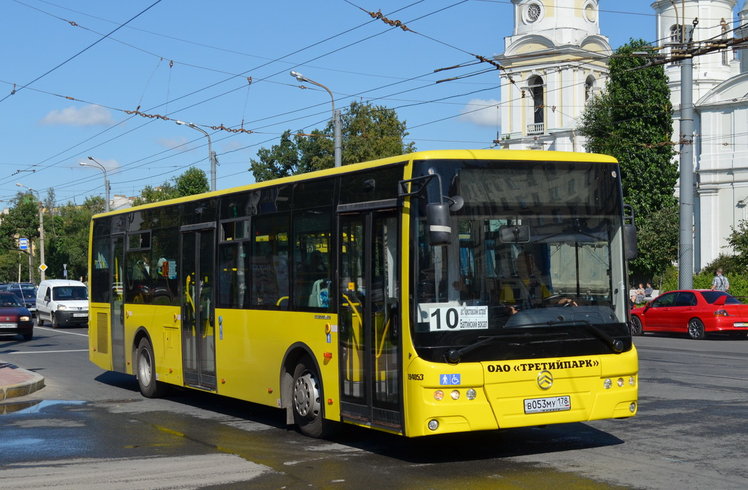 Фото с fotobus.msk